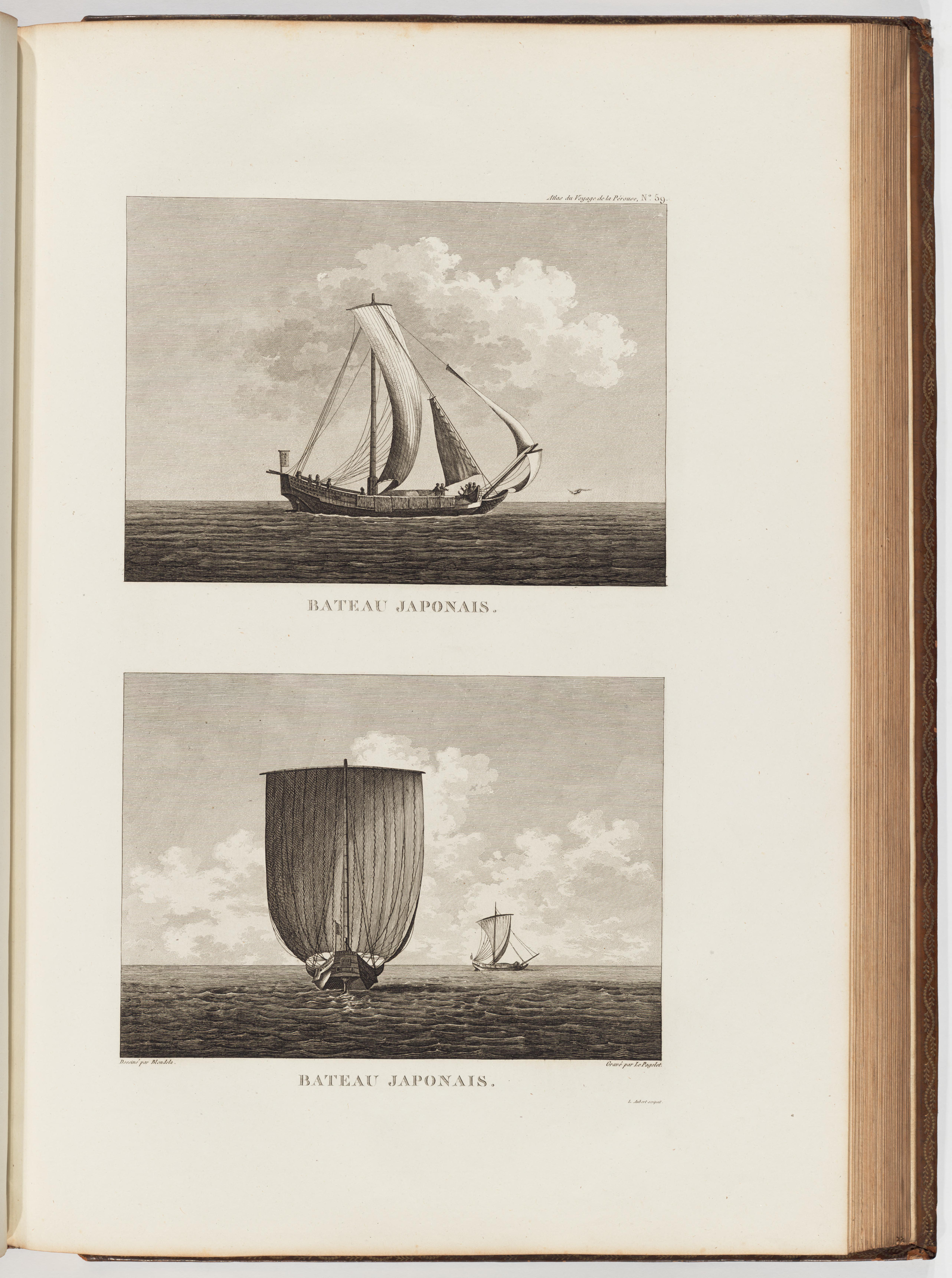 Voyage de La Pérouse autour du monde /publié conformément au décret du 22 avril 1791, et rédigé par L.A. Milet-Mureau.